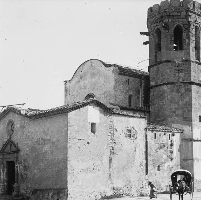 Una església de Sant Sadurní d'Anoia. Josep Salvany i Blanch (1913)